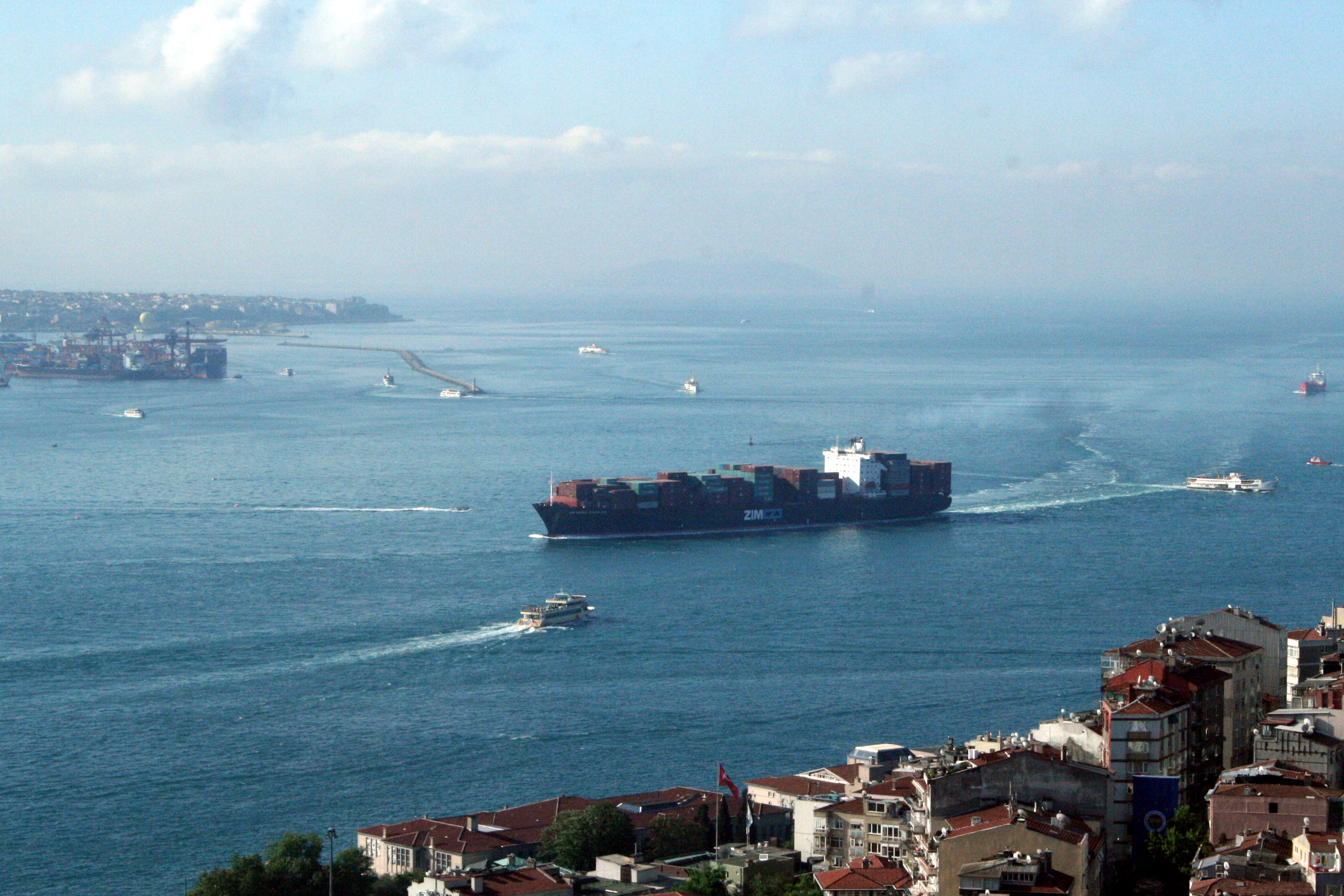 Un ^porte-conteneur entrant dans le Bosphore devant le port d'Istamboul.